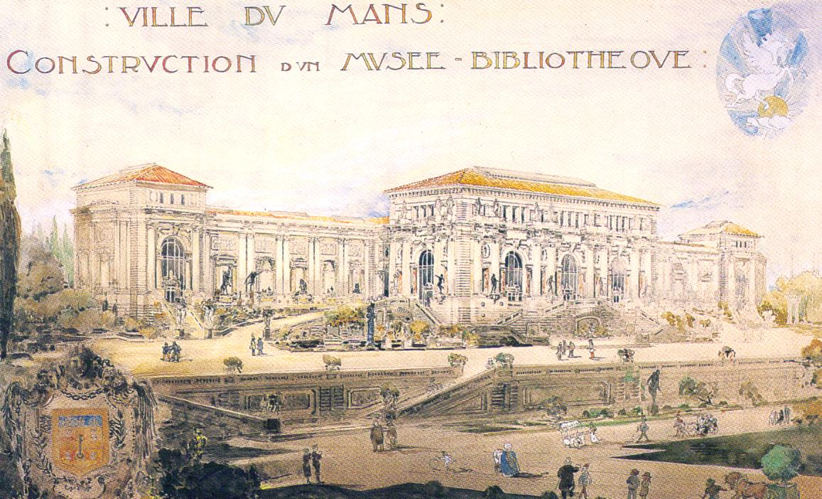 Projet du Musée Bibliothèque du Mans à la place de l'actuel musée de Tessé.